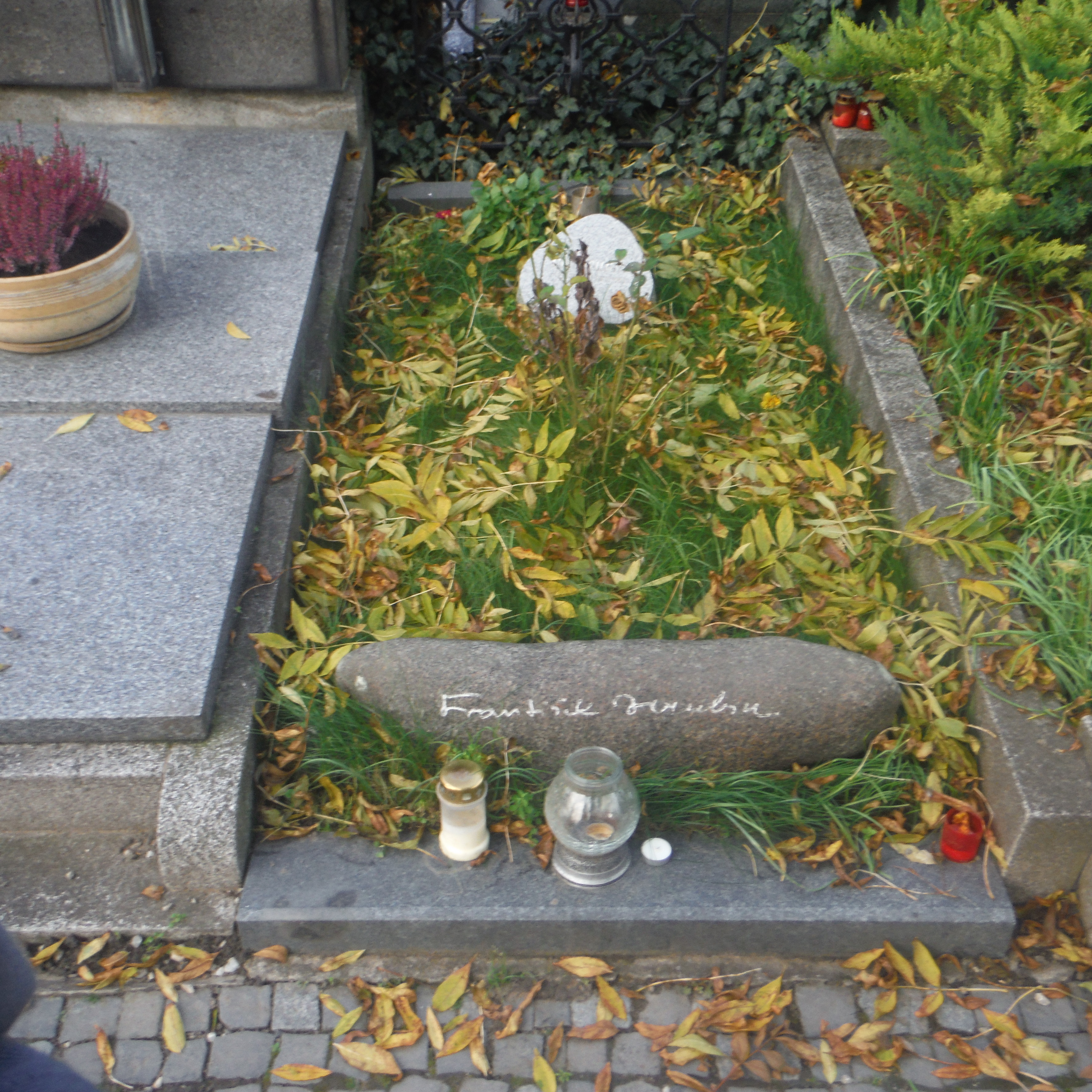 Hrob Františka Hrubína, českého básníka